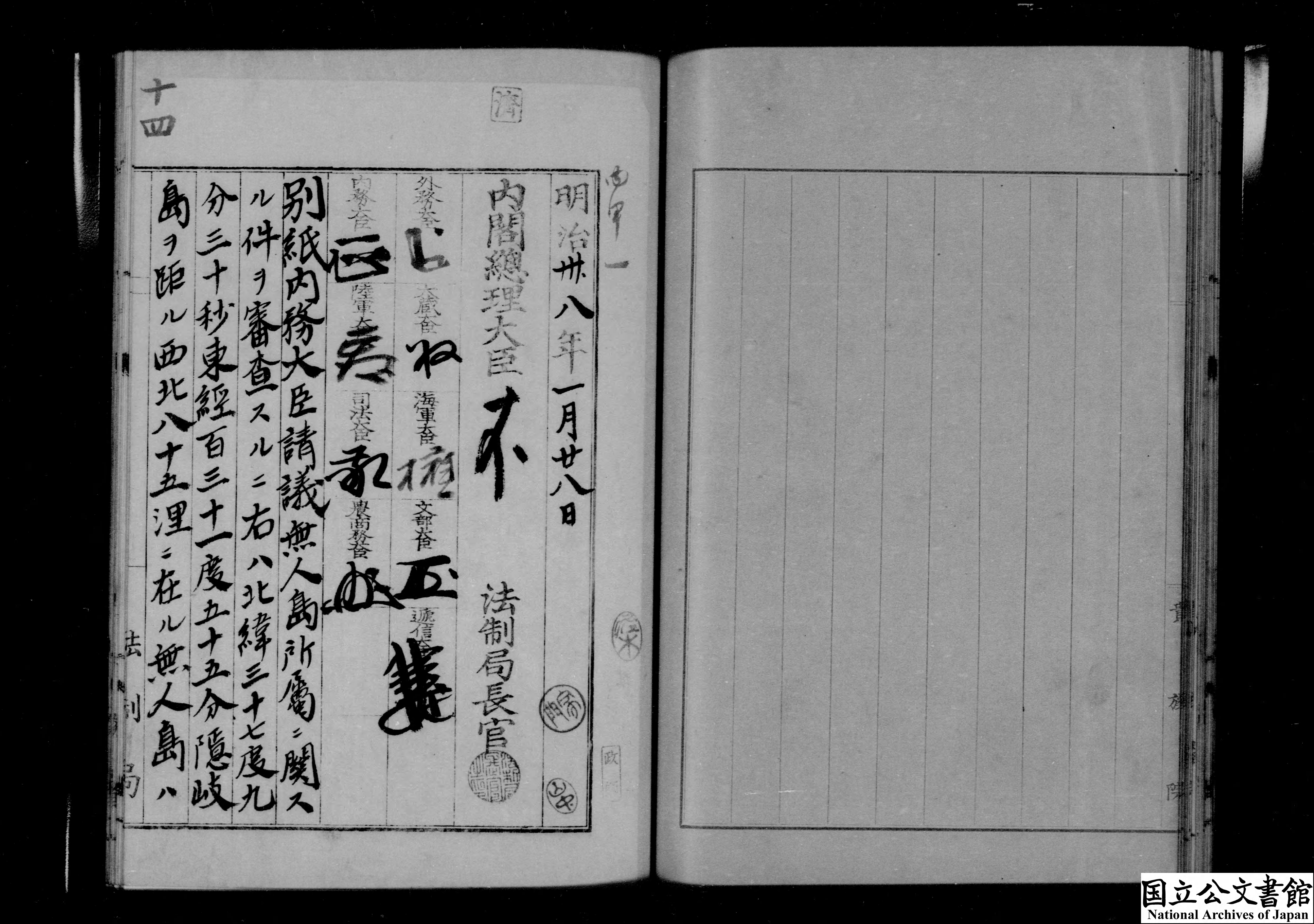 件名 隠岐島ヲ距ル西北八十五哩ニ在ル無人島ヲ竹島ト名ヶ島根県所属隠岐島司ノ所管ト為ス 階層 公文書＞＊内閣・総理府＞太政官・内閣関係＞第六類 公文類聚＞公文類聚・第２９編・明治３８年＞簿冊 : 数件の件名または細目を１冊に綴じたものです。公文類聚・第二十九編・明治三十八年・第一巻・政綱・帝国議会・行政区・地方自治・雑… 請求番号 本館-2A- 011-00・類00981100 件名番号 014 作成部局 内閣 年月日 明治38年02 月02日 資料内容 無人島所属に関する件 北緯３７度９分３０秒東経１３１度５５分隠岐島を距る西北８５浬に在る無人島は他国に於て之を占領したりと認むへき形跡なく一昨３６年本邦人中井養三郎なる者に於て漁舎を搆へ人夫を移し猟具を備へて海驢猟に着手し今回領土編入並に貸下を出願せし所此際所属及島名を確定するの必要あるを以て該島を竹島と名け自今島根県所属隠岐島司の所管と為さんとす 関連事項 請議 マイクロフィルム リール番号：017300、開始コマ：1375 画像データ グレー画像